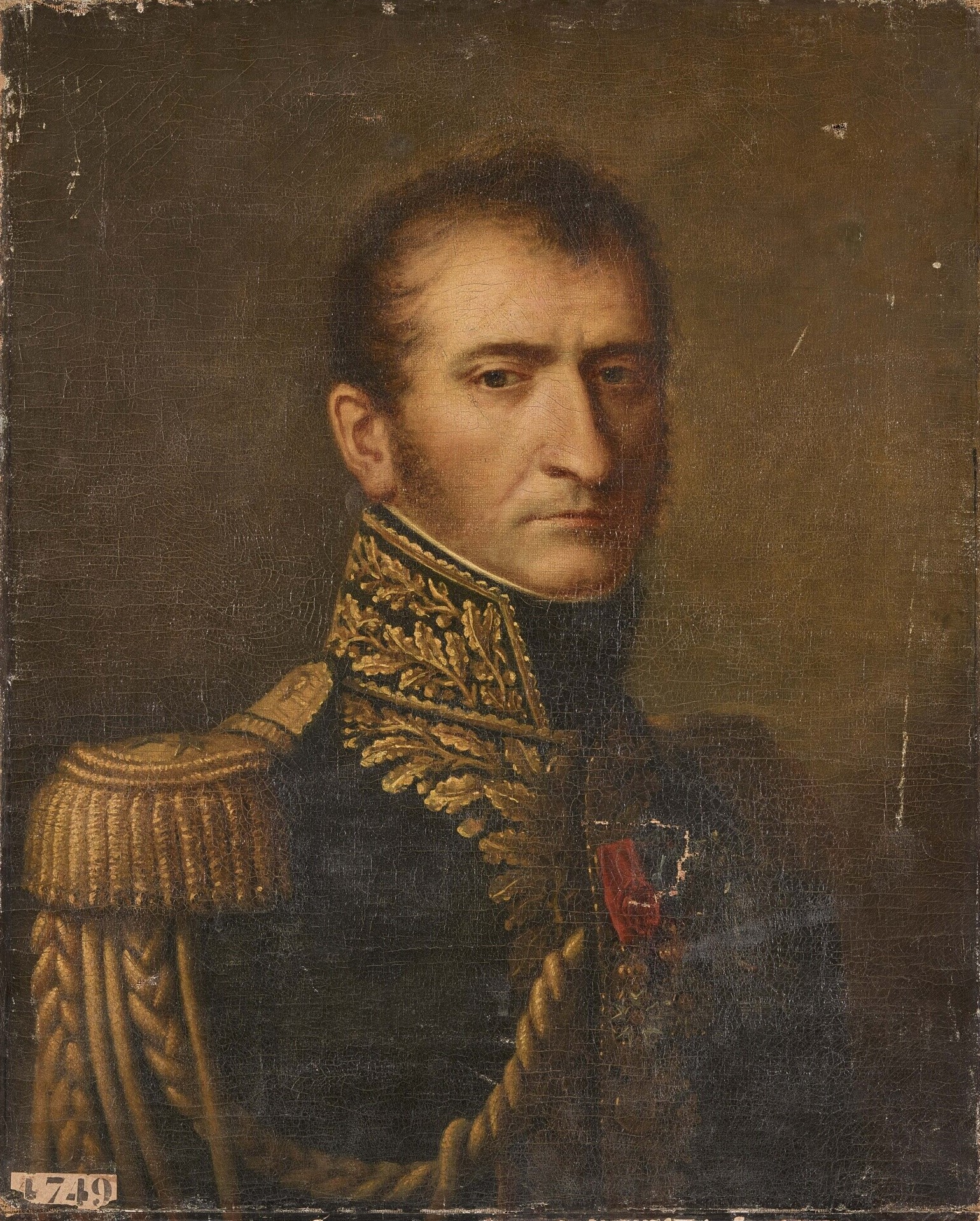 Henri-François Delaborde (1764-1833), général de division de la Révolution et de l'Empire. Il se distingue au Portugal à la bataille de Roliça en 1808 puis commande une division de la Jeune Garde pendant la campagne de Russie.